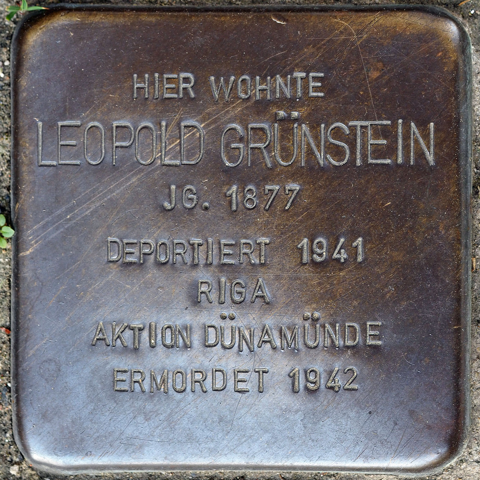 Stolpersteine MG: Grünstein, Leopold